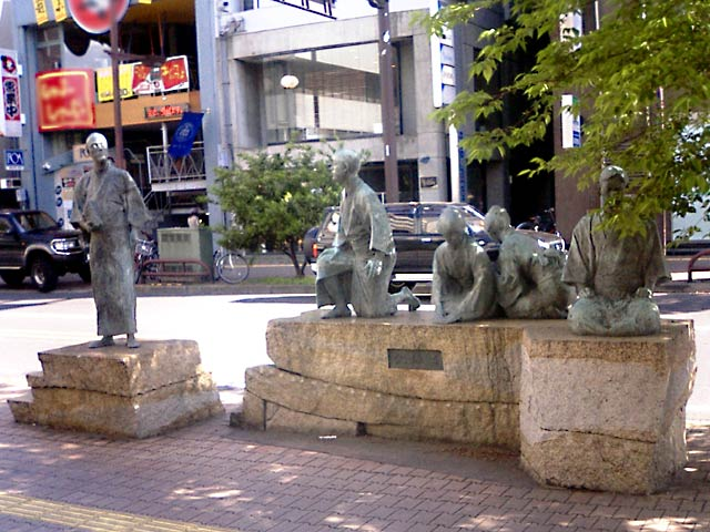 『父帰る』（作者：菊池寛）の銅像 - 菊池寛通り（日本国香川県高松市）